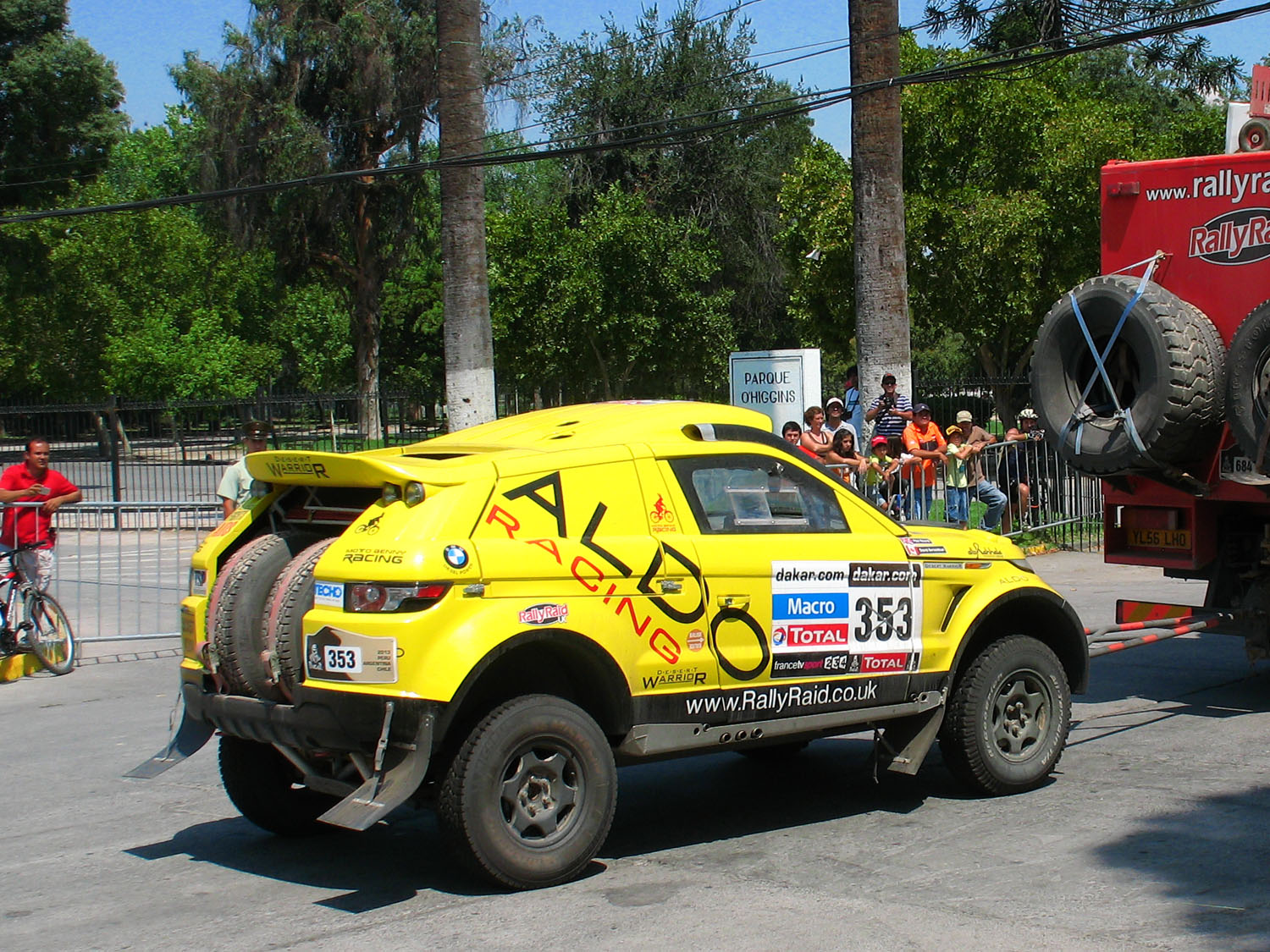 Range Rover Evoque Coupe Dakar 2013